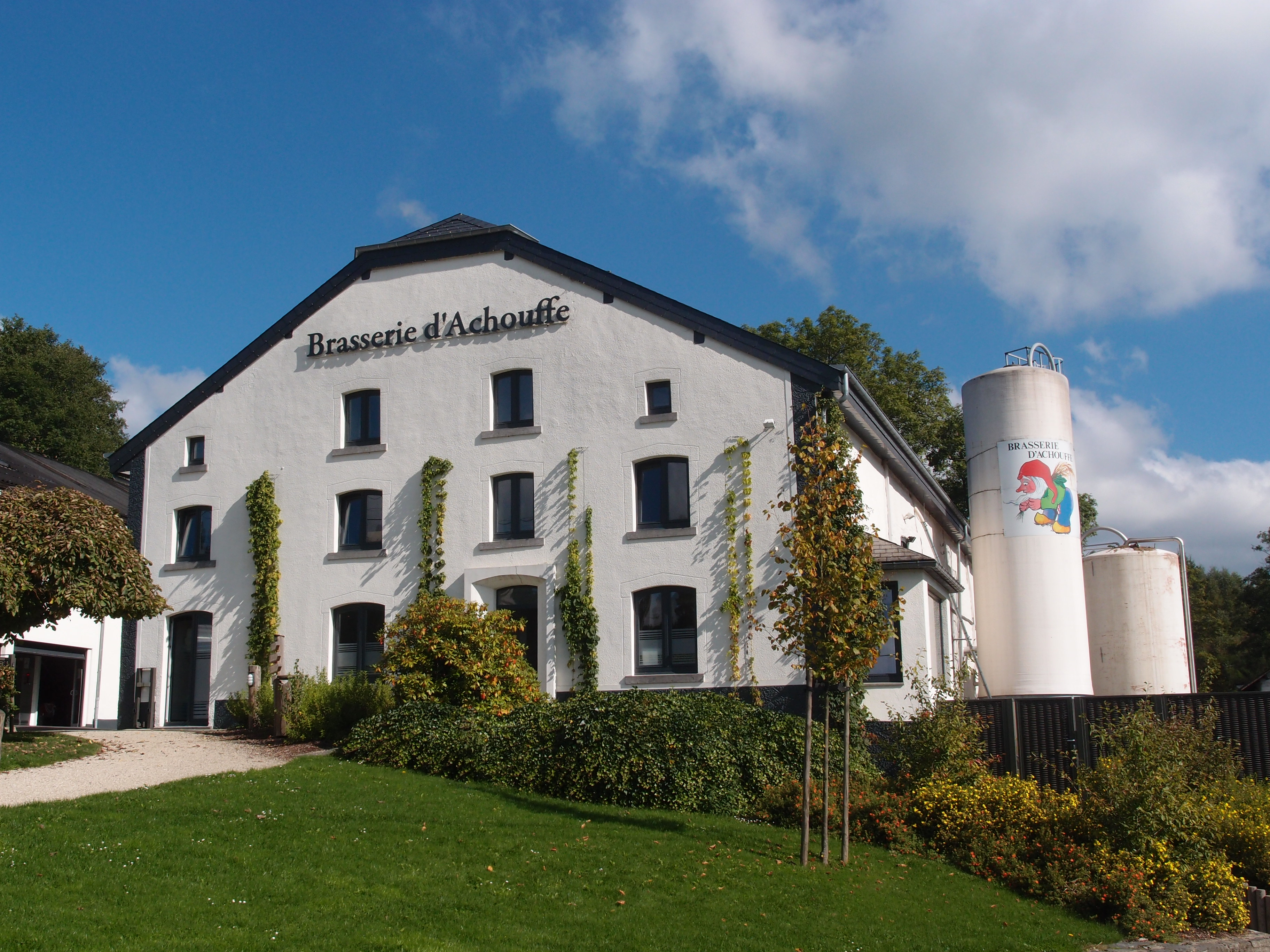 Teilansicht der belgischen Brauerei "Brasserie d'Achouffe" in Houffalize Datum: 03.09.2014 Urheber: M. Pfeiffer alias Gordito1869 Quelle: privates Fotoarchiv des Urhebers